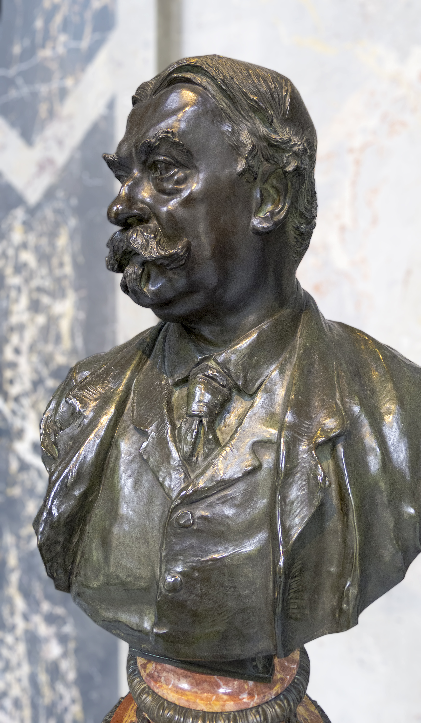 Büste von Carl von Hasenauer im Kunsthistorischen Museum in Wien 1